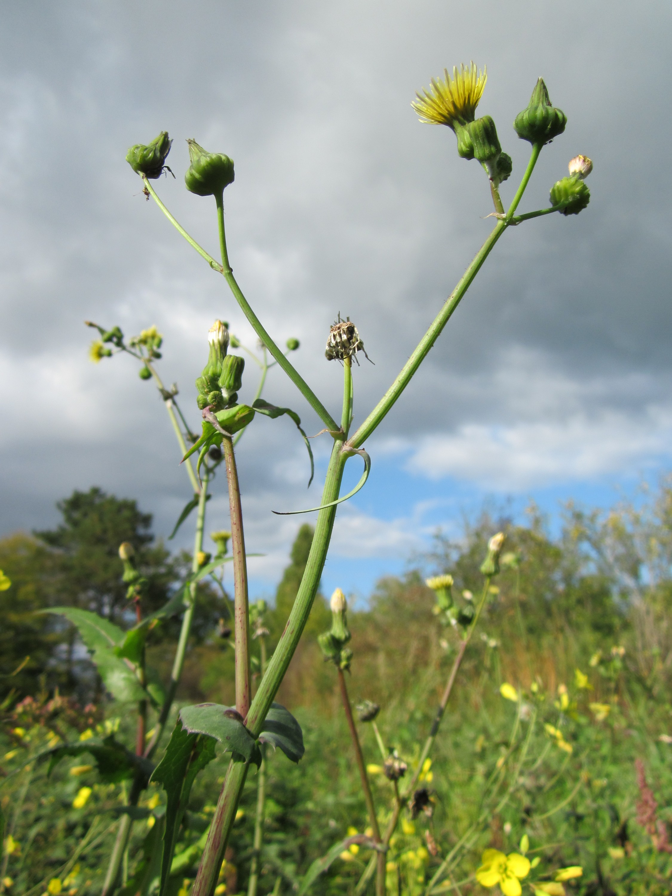 Raue Gänsedistel (Sonchus asper) auf einer Ruderalfläche beim Reilinger Friedhof